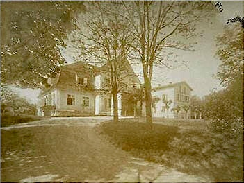 Schloss Neudorf bei Bentschen, Provinz Posen